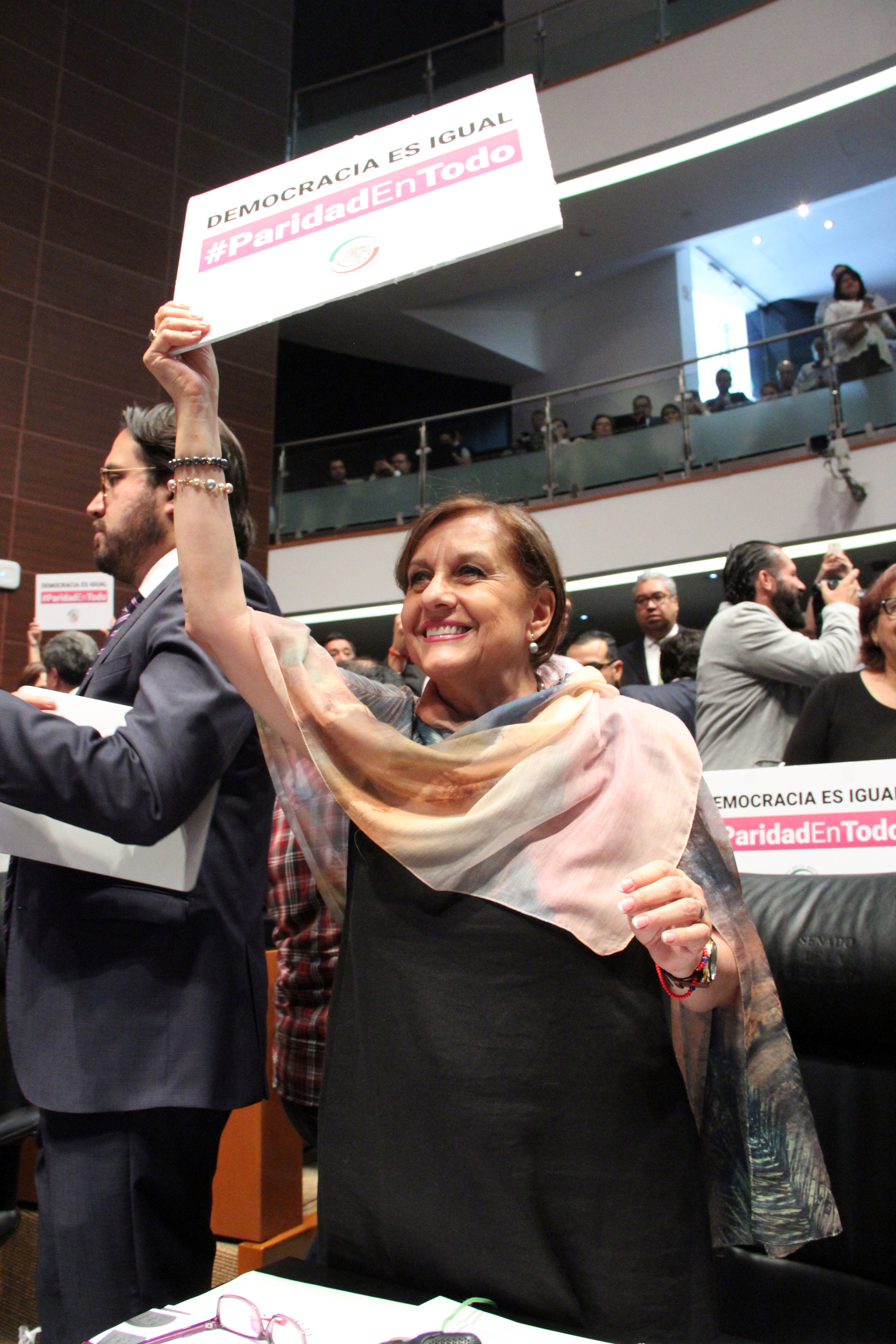 En el Pleno del Senado de la República durante la aprobación de las históricas Reformas en Materia de Paridad Constitucional